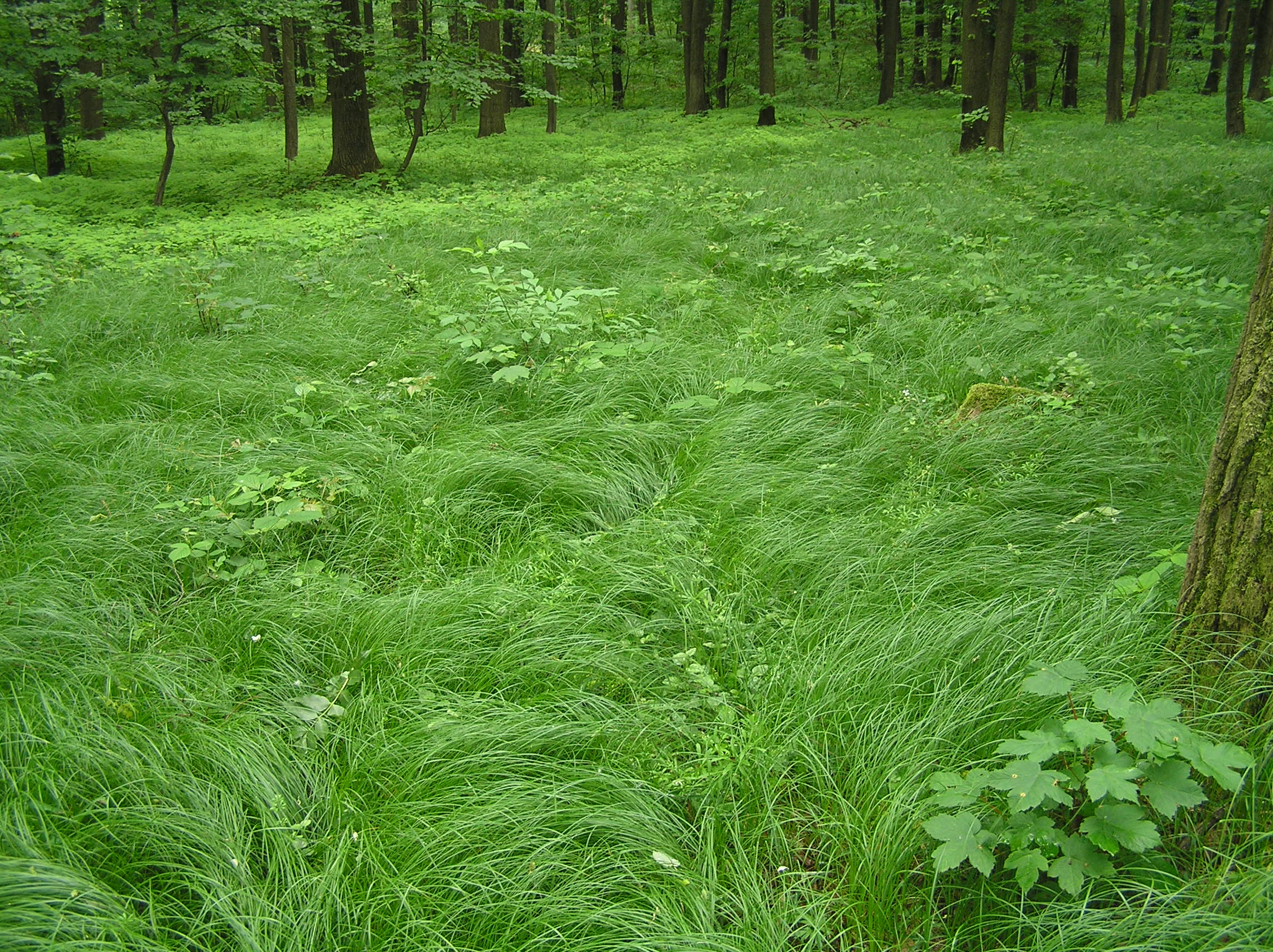 Carex brizoides, Bohuslávky, Czech Republic